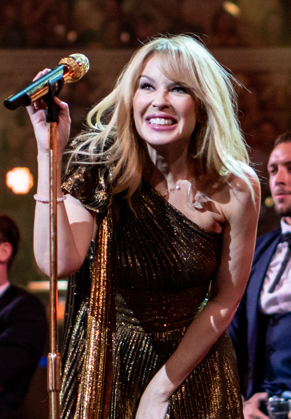 QueenbdayRAH210418-21